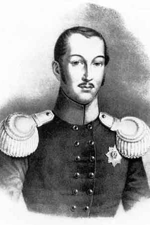 Alexander Karel van Anhalt-Bernburg (1805-1863)